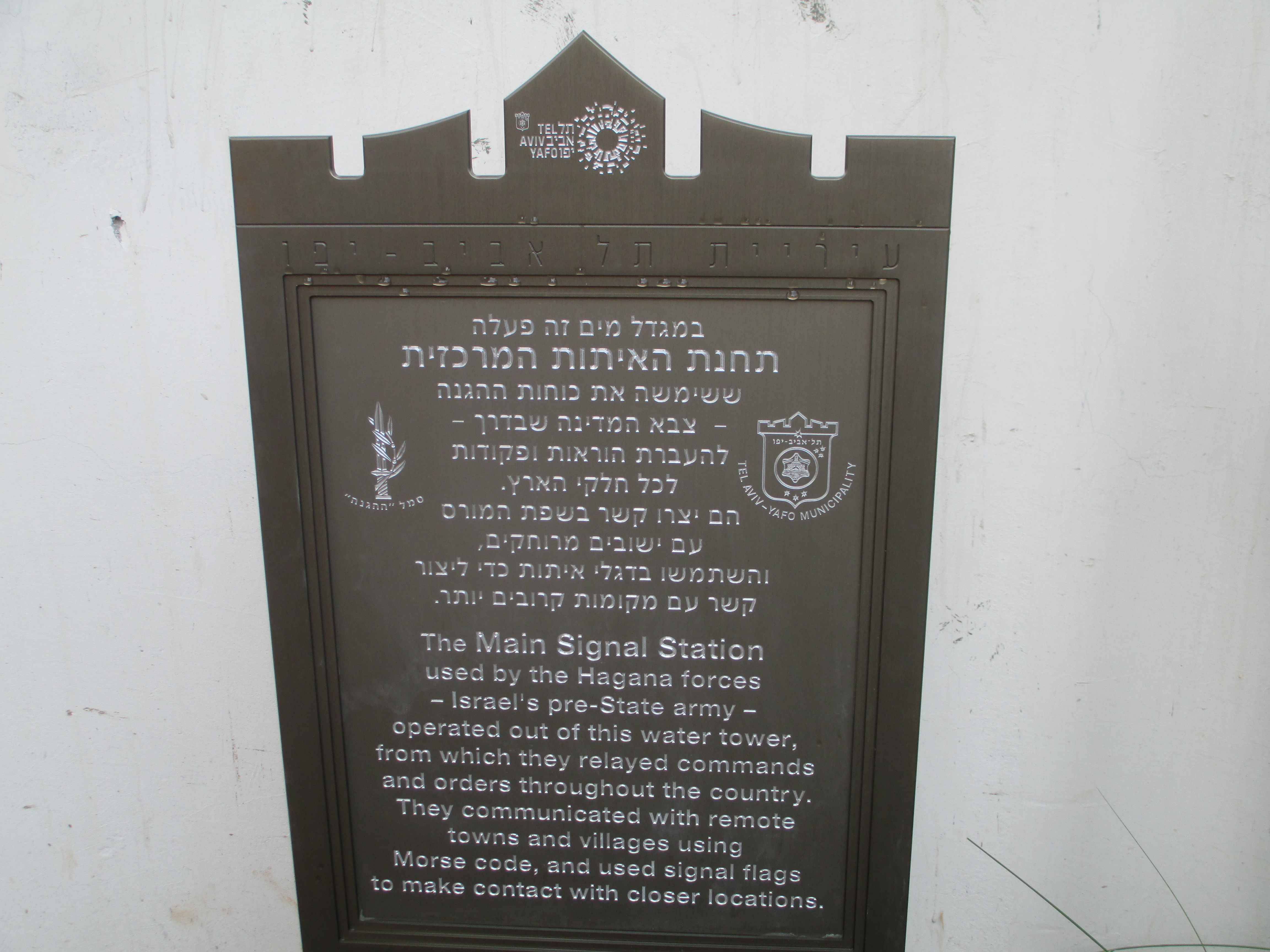 לוחית זיכרון במגדל המים ברחוב מאז"ה 36 בתל אביב